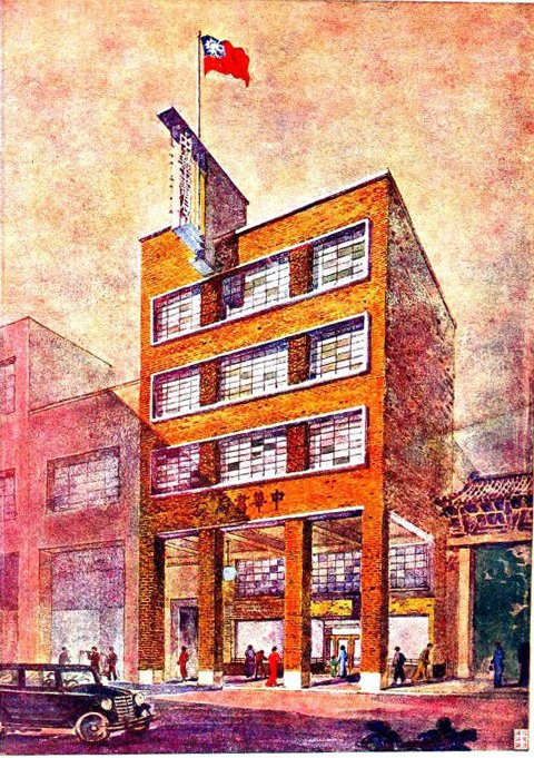 位於廣州市永漢路的中華書局廣州分局。現在為聯合書店。